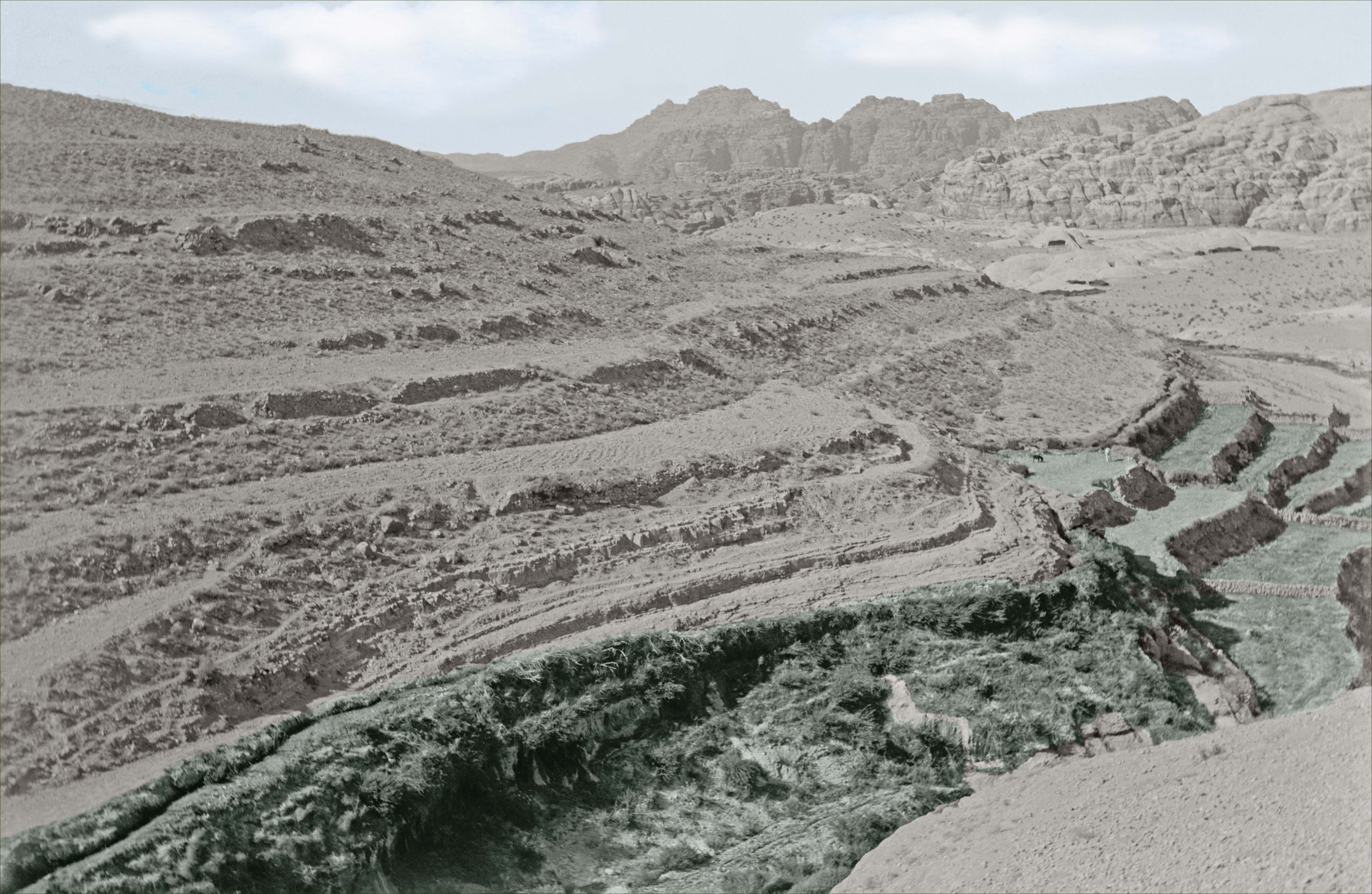 Cultures en terrasses dans la vallée du wadi Ma'an, près de Pétra. Vers 1916.